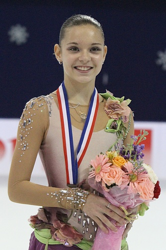 Аделина Сотникова с бронзовой медалью Кубка Китая 2011.